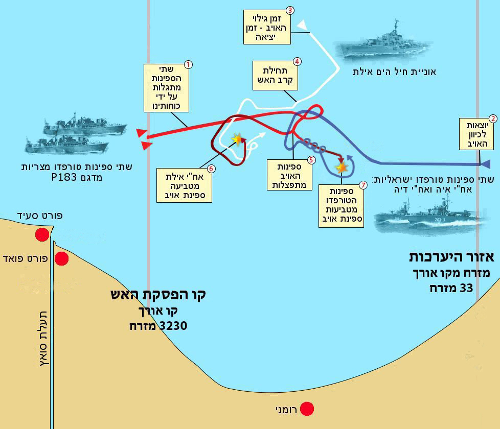 תרשים קרב רומני